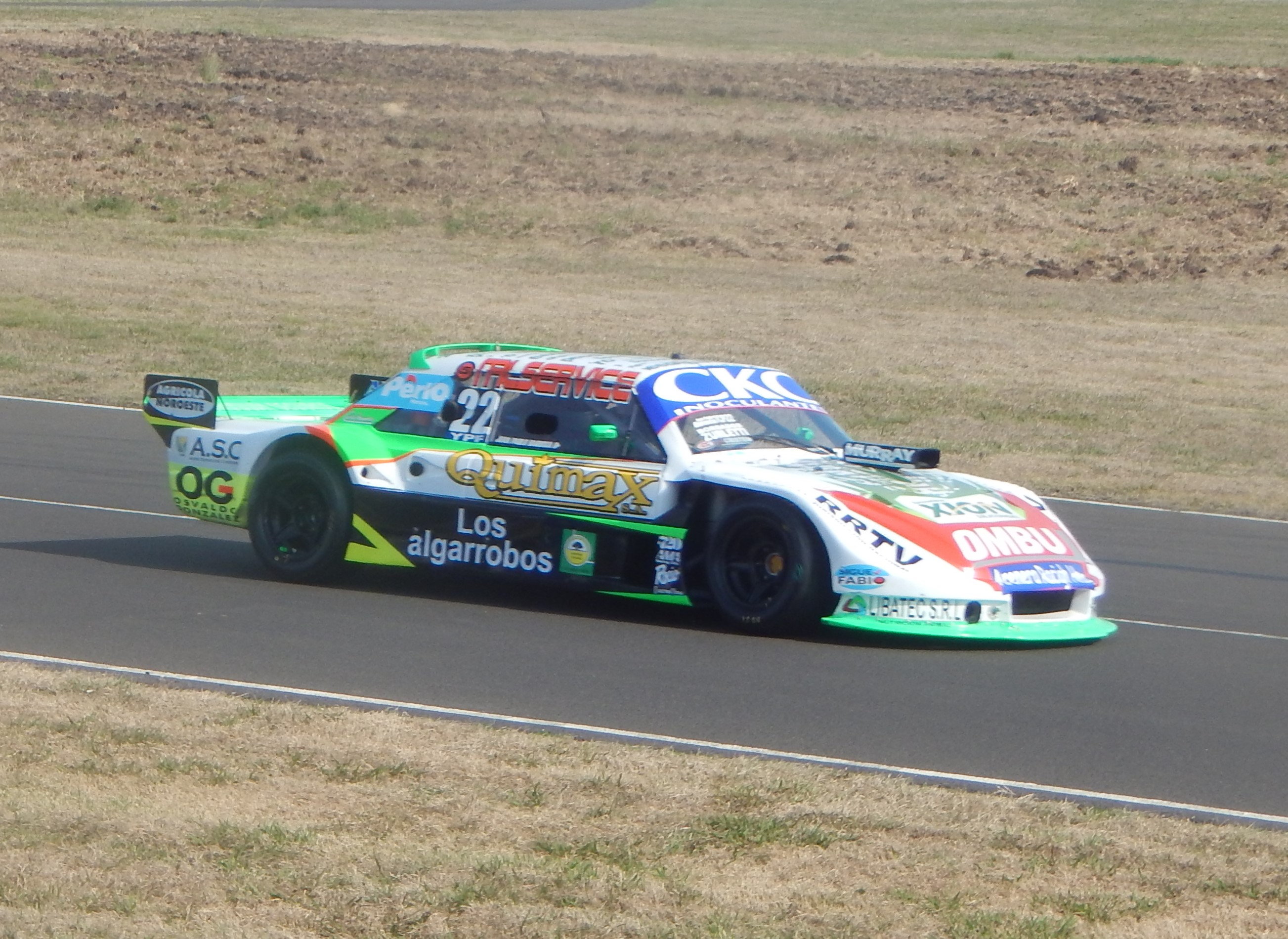 Juan Pablo Barucca TC Pista en Paraná 2015